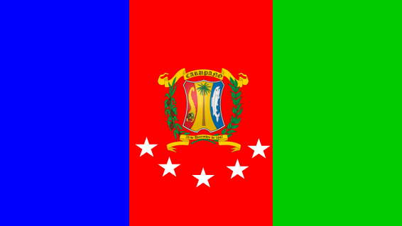 Nueva bandera del municipio Bermudez. Estado Sucre. Venezuela